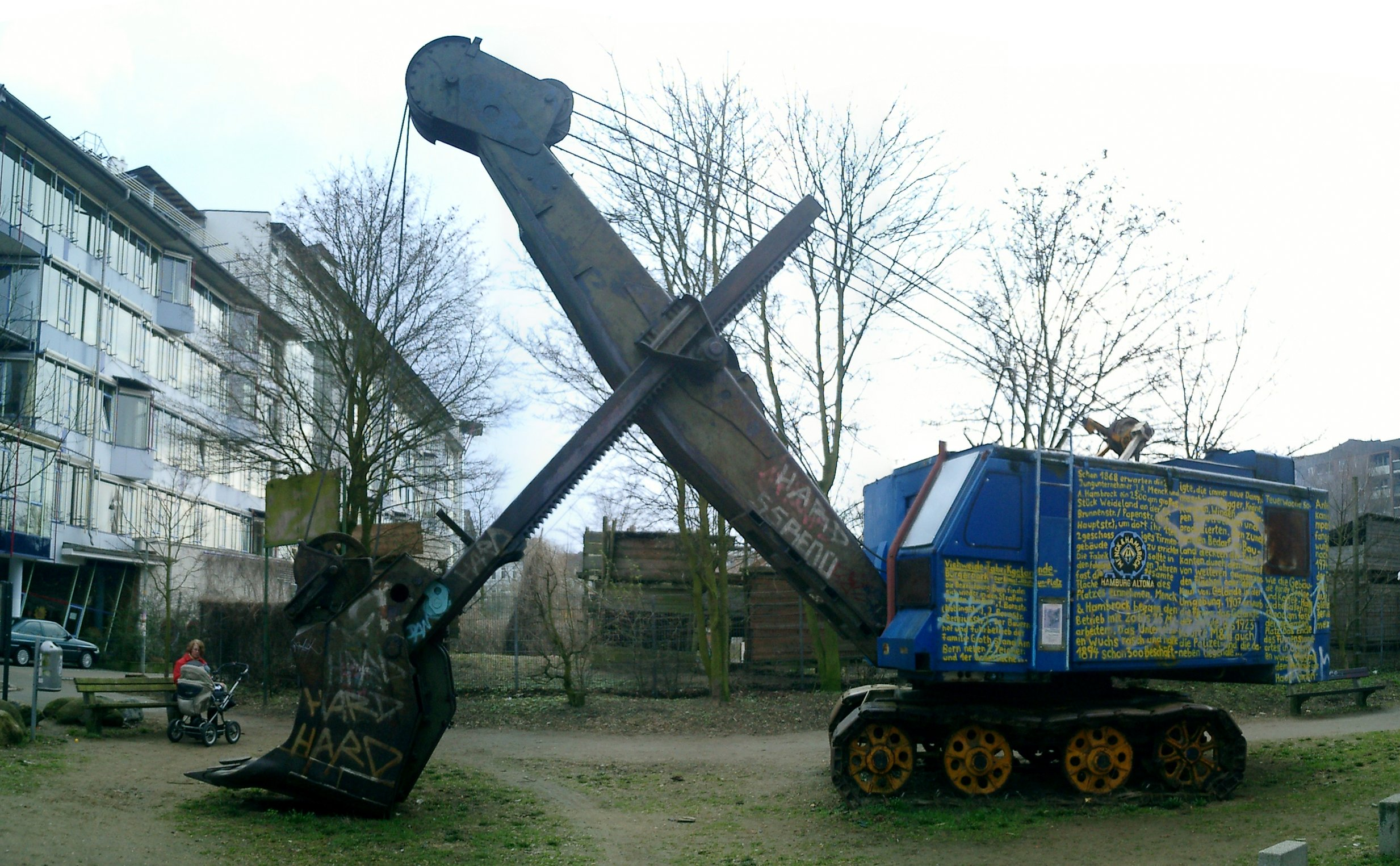 Das Menckmal in Hamburg-Ottensen: Ein M152 von 1954. Er steht an der Stelle, wo das Menck-Werk bis 1974 stand. Dieser Bagger ist noch betriebsfähig und wird vom Stadtteilarchiv Ottensen liebevoll unterhalten und manchmal auch noch vorgeführt.